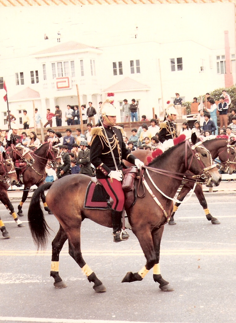 Oficial del Regimiento de Caballeria "Mariscal Domingo Nieto" Escolta del Persidente de la Republica del Perú, durante la Parada Militar por Fiestas Patrias.